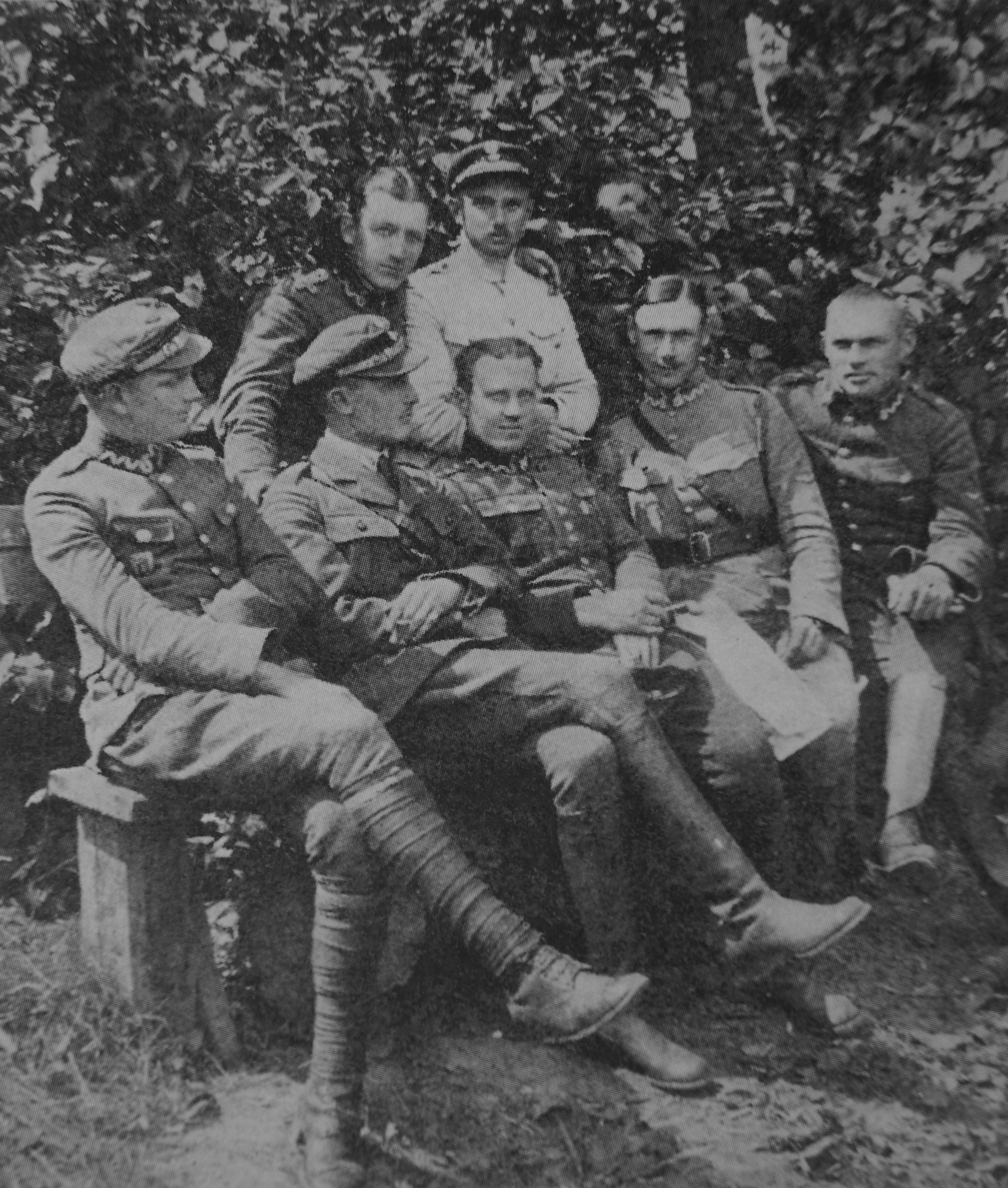 Personel latający 18-ej i 4-ej eskadry wywiadowczej w Helenowie pod Mołodecznem: ppor. Marjan Sioda, por. Bolesław Narkowicz, por. Stanisław Gogoliński ppor. Władysław Kozłowski, ppor. Karol Orłoś, rtm. Bronisław Wąsowski.